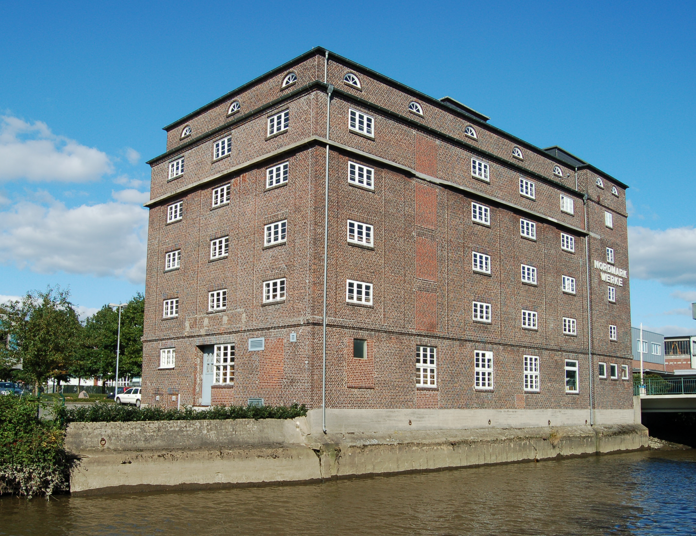 Ehemalige Bauernmühle (Lagerhaus), gebaut von Klaus Groth 1924. Eingestuft als Kulturdenkmal mit besonderen Architektonischen und Städtebaulichen Wert. Architekt: Klaus Groth, fotografiert am Tag des offenen Denkmals 2008